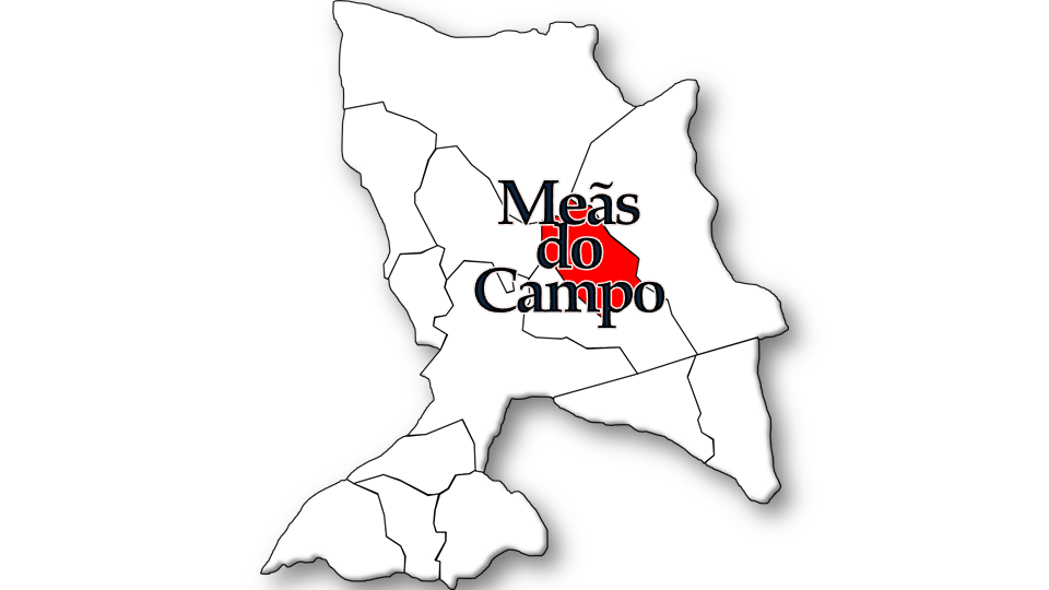 População